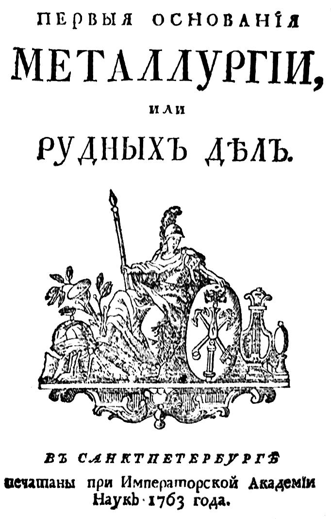 Титульный лист книги "Первые основания металлургии или рудных дел", 1763